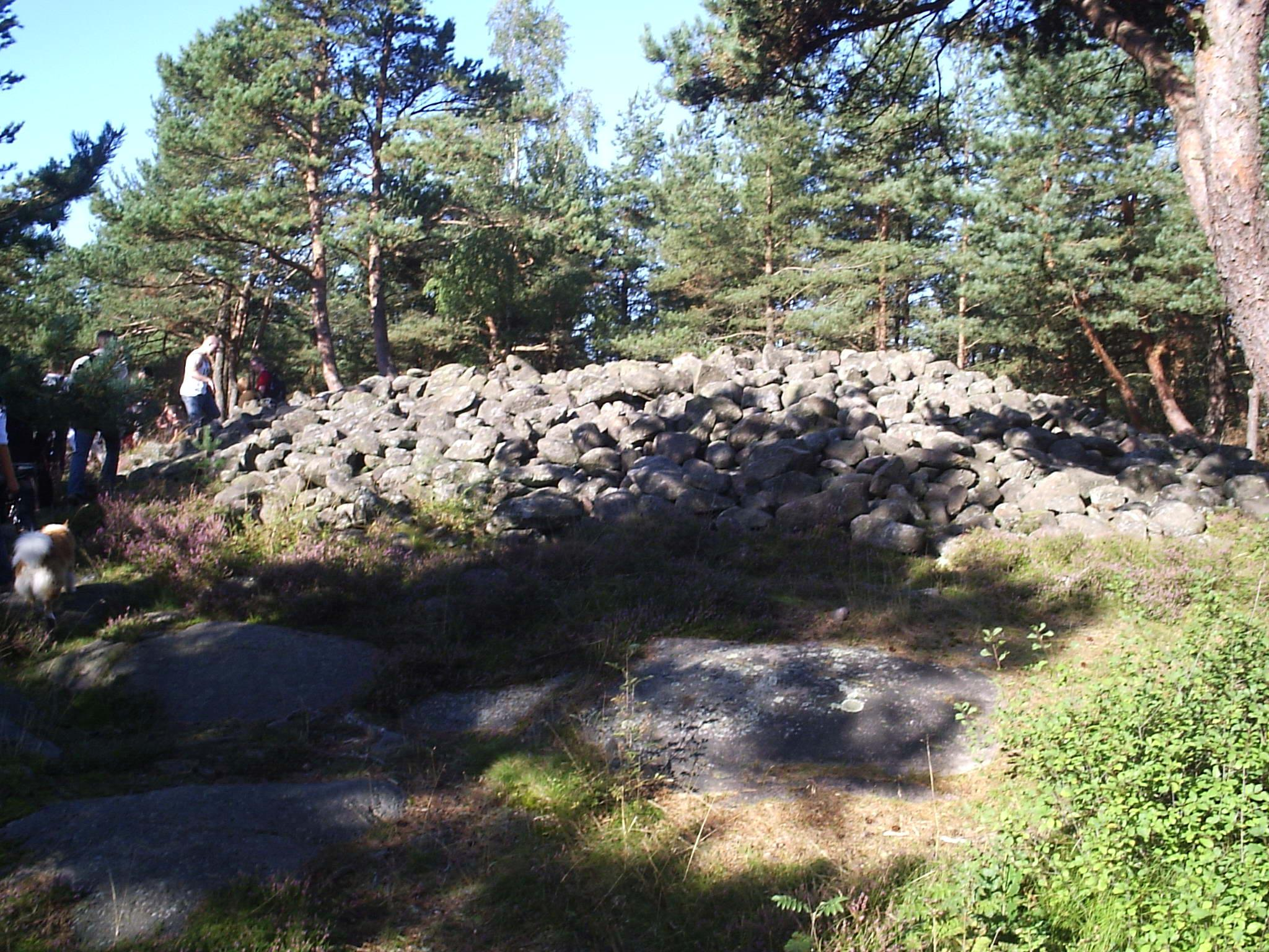 Det runda gravröset Skändlarös (RAÄ-nr Säve 49:1) på Skändlaberget i Säve socken på Hisingen, Göteborgs kommun, Bohuslän, Västra Götalands län, Sverige. Fotograferat den 1 september 2005 av Harri Blomberg.